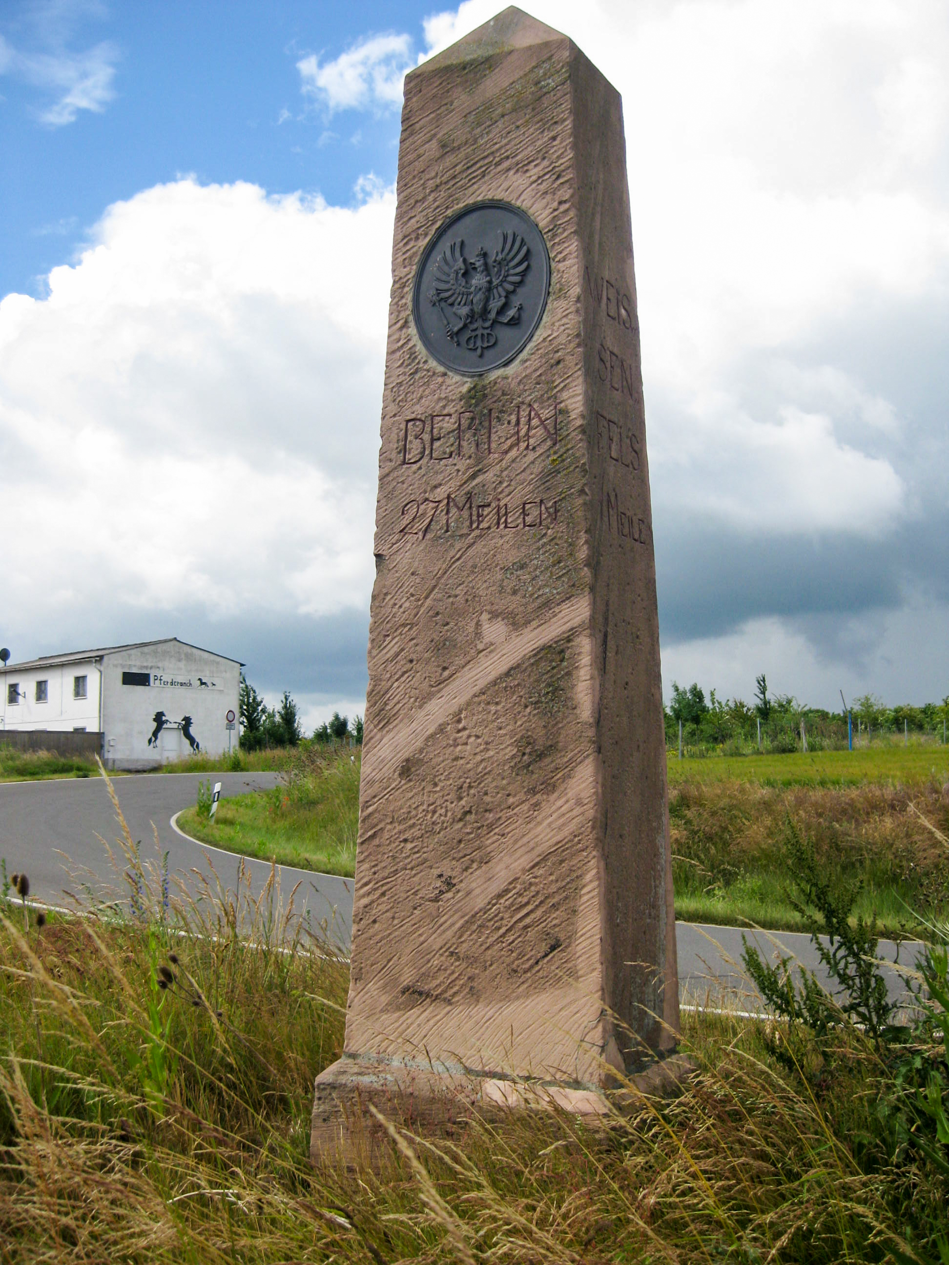 Preußischer Ganzmeilenobelisk mit Sitzbank (0816) bei Nessa. Inschrift: ZEITZ 2 1/5 MEILE ; BERLIN 27 MEILEN ; WEISSENFELS 1 MEILE